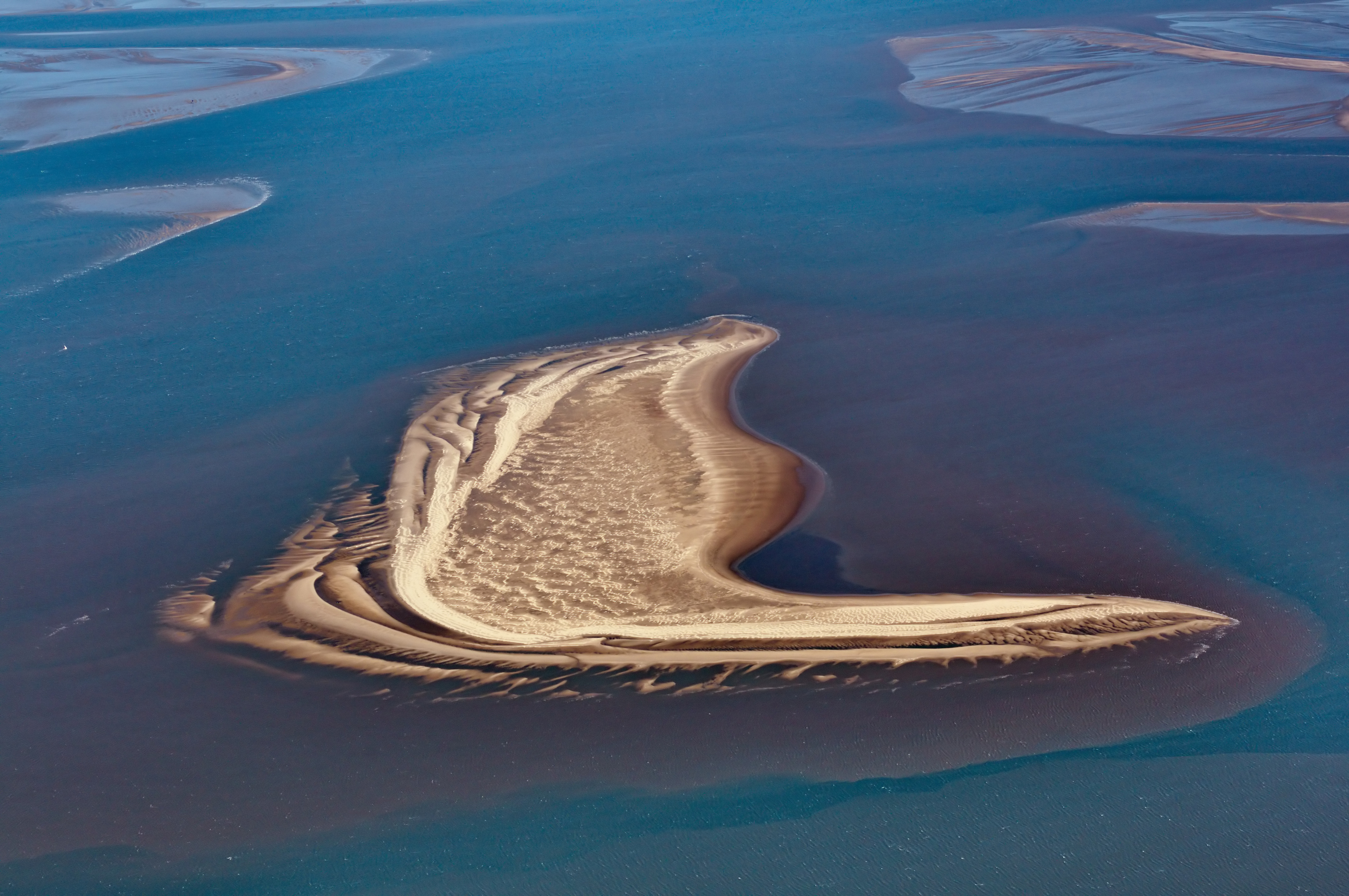 Fotoflug über das nordfriesische Wattenmeer - Tertius (von SW)